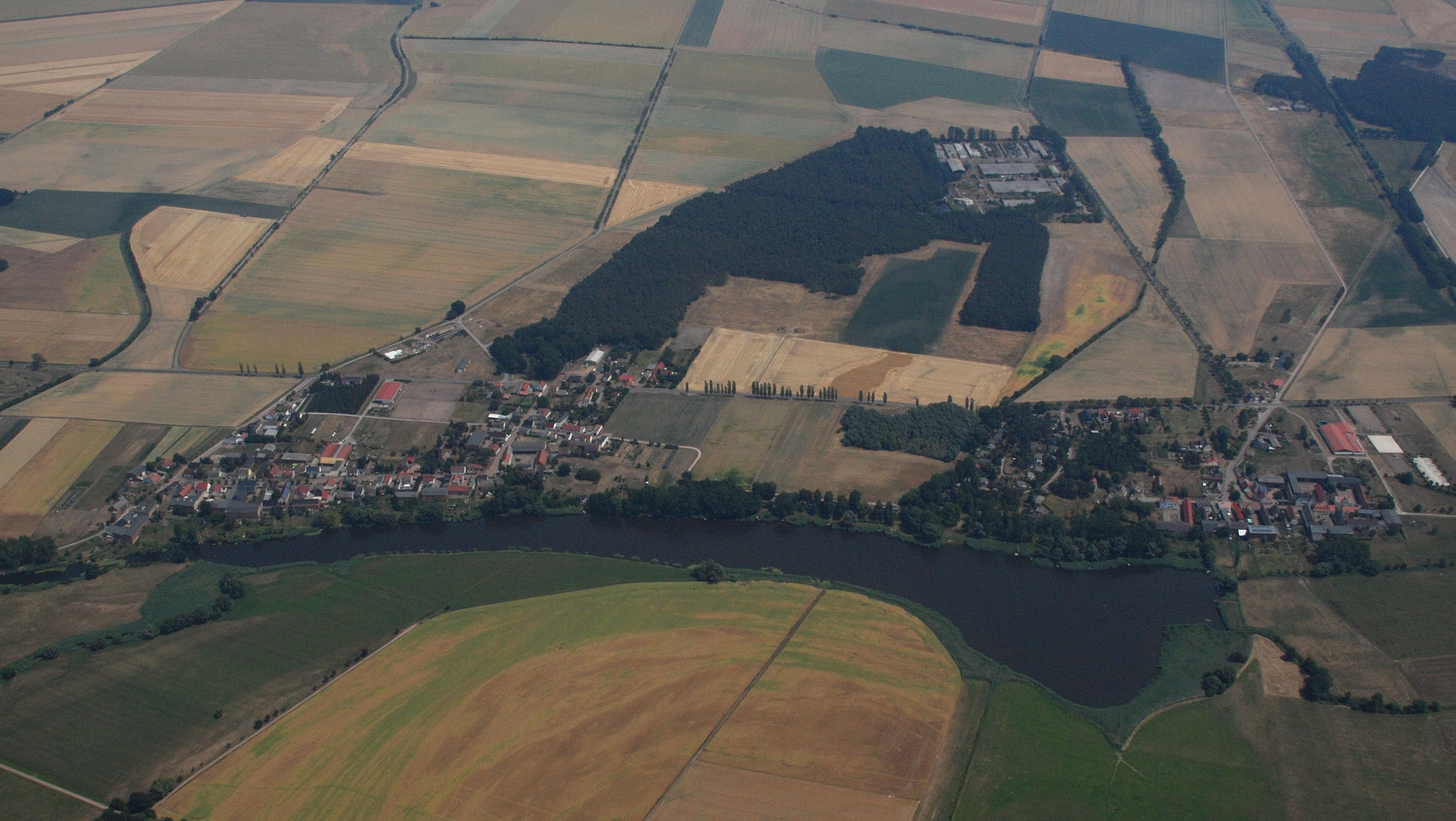 Gödnitz, Luftaufnahme (2015)